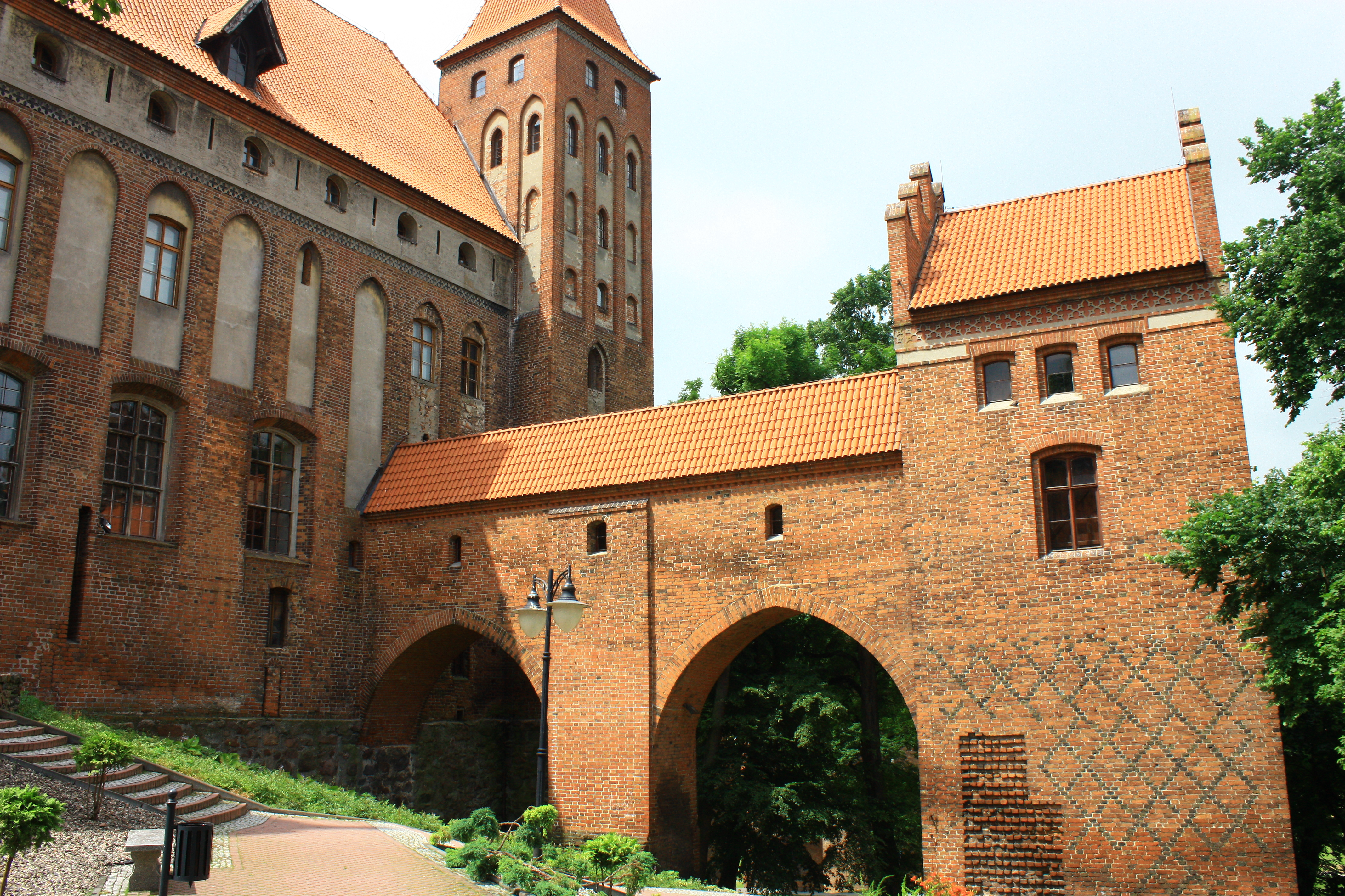 Kwidzyn, Zamek Kapituły Pomezańskiej, ob. muzeum, ok. 1322-XIX